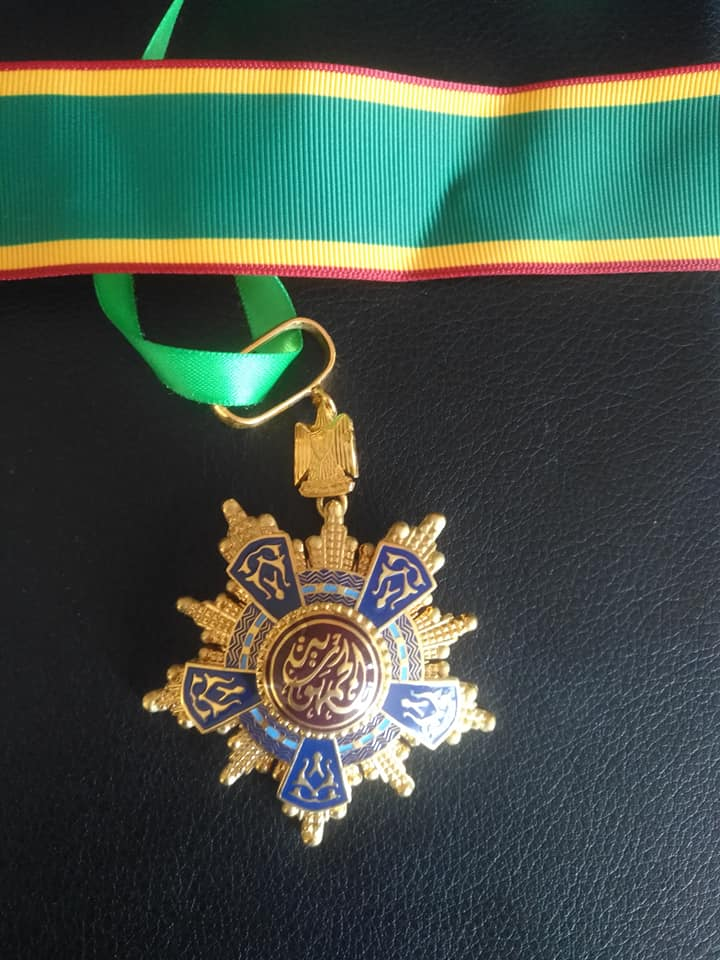 رصيعة ثمينة